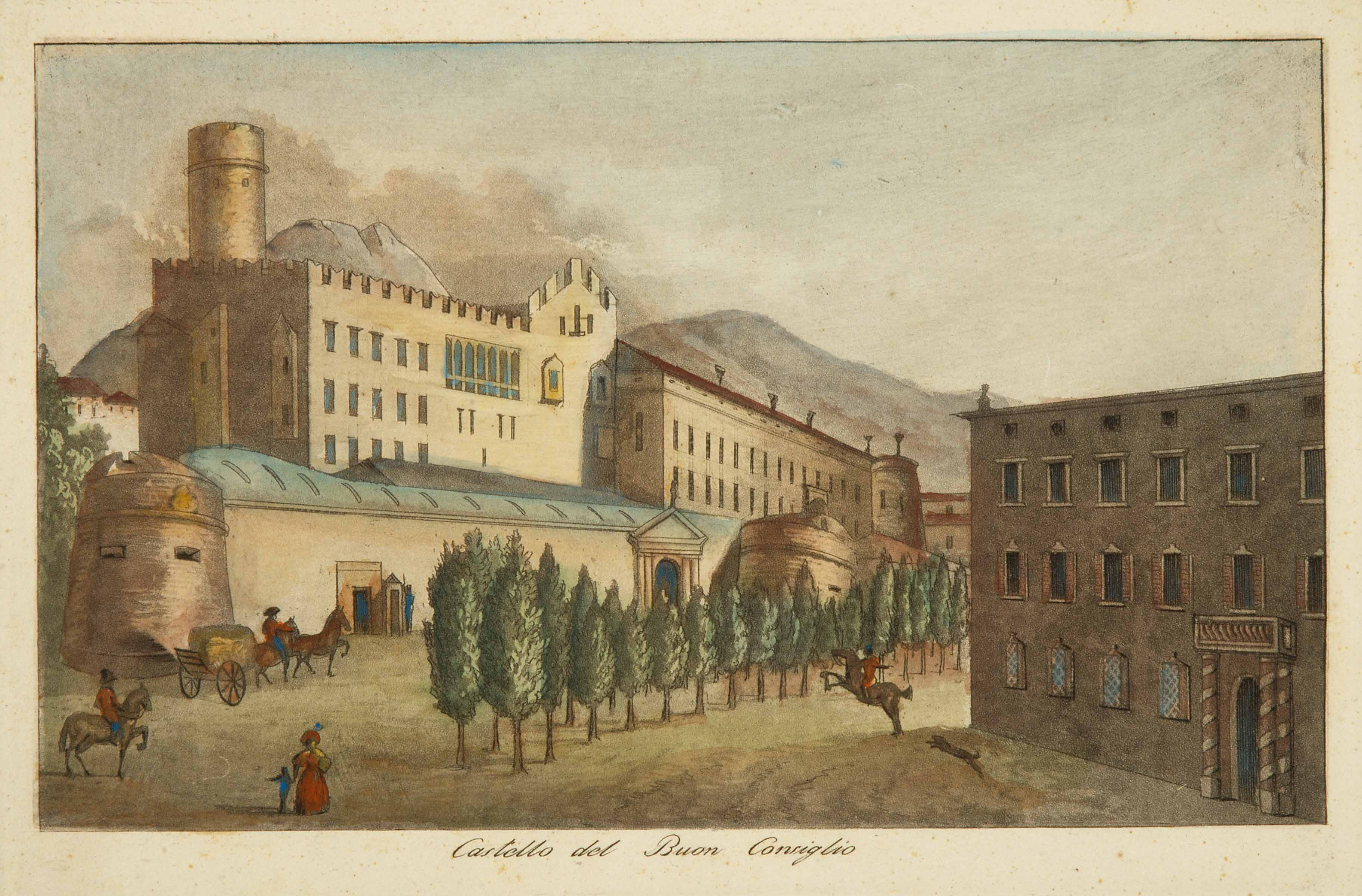 Calcografia dono di Velia Galeati Franzinelli, pubblicata probabilmente tra il 1800 e il 1850.